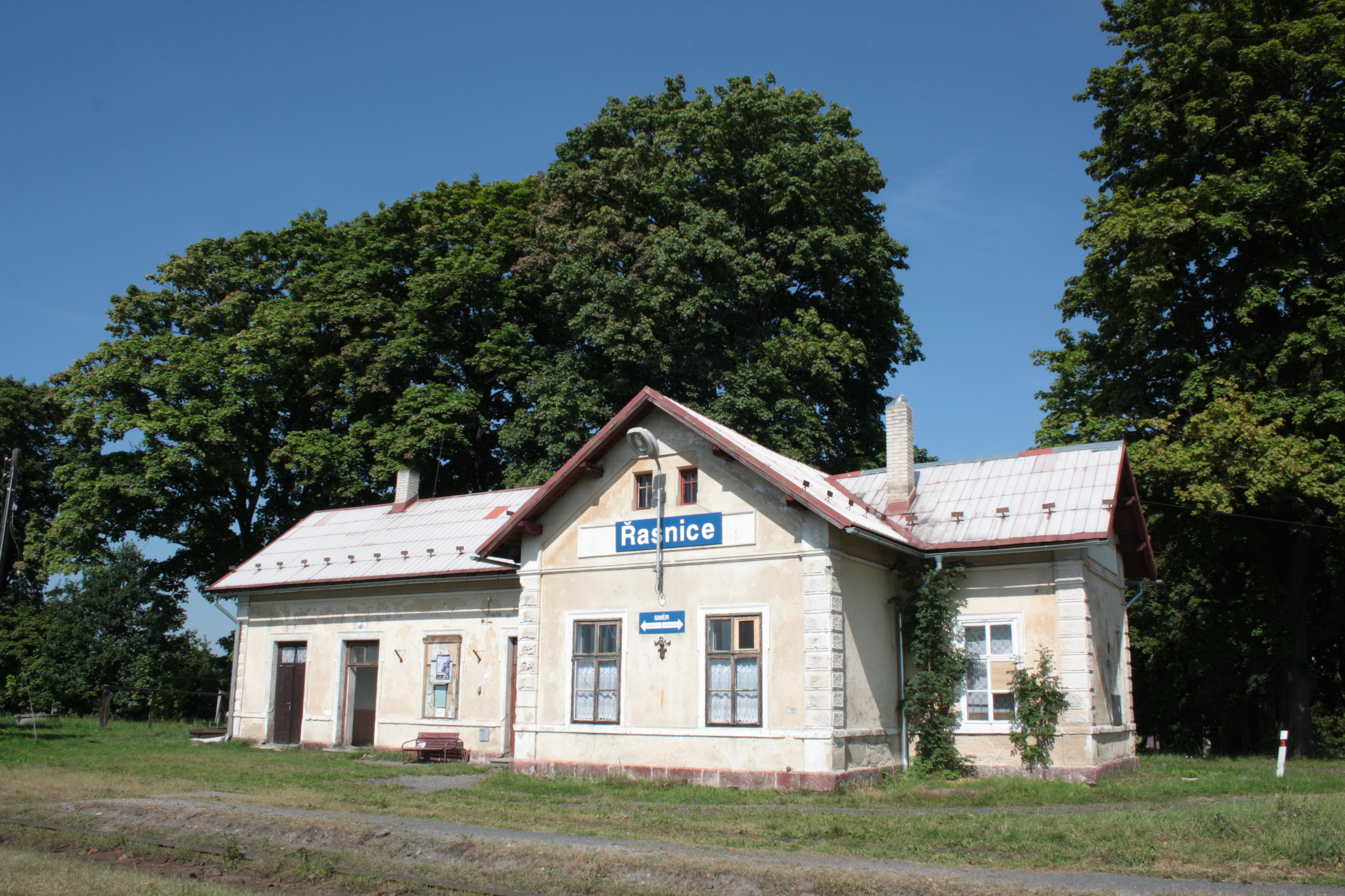 This photograph was taken with a DSLR from WMCZ's Camera grant. Dům číslo popisné 315 v Dolní Řasnici (železniční zastávka Řasnice).